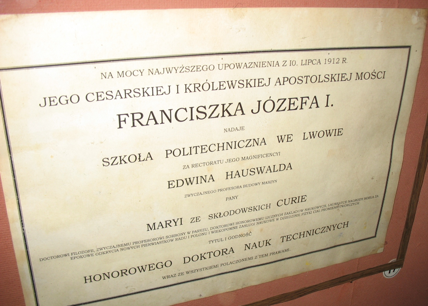 Диплом почесного доктора технічних наук, наданий Марії Склодовській-Кюрі 10 липня 1912 Львівською політехнічною школою